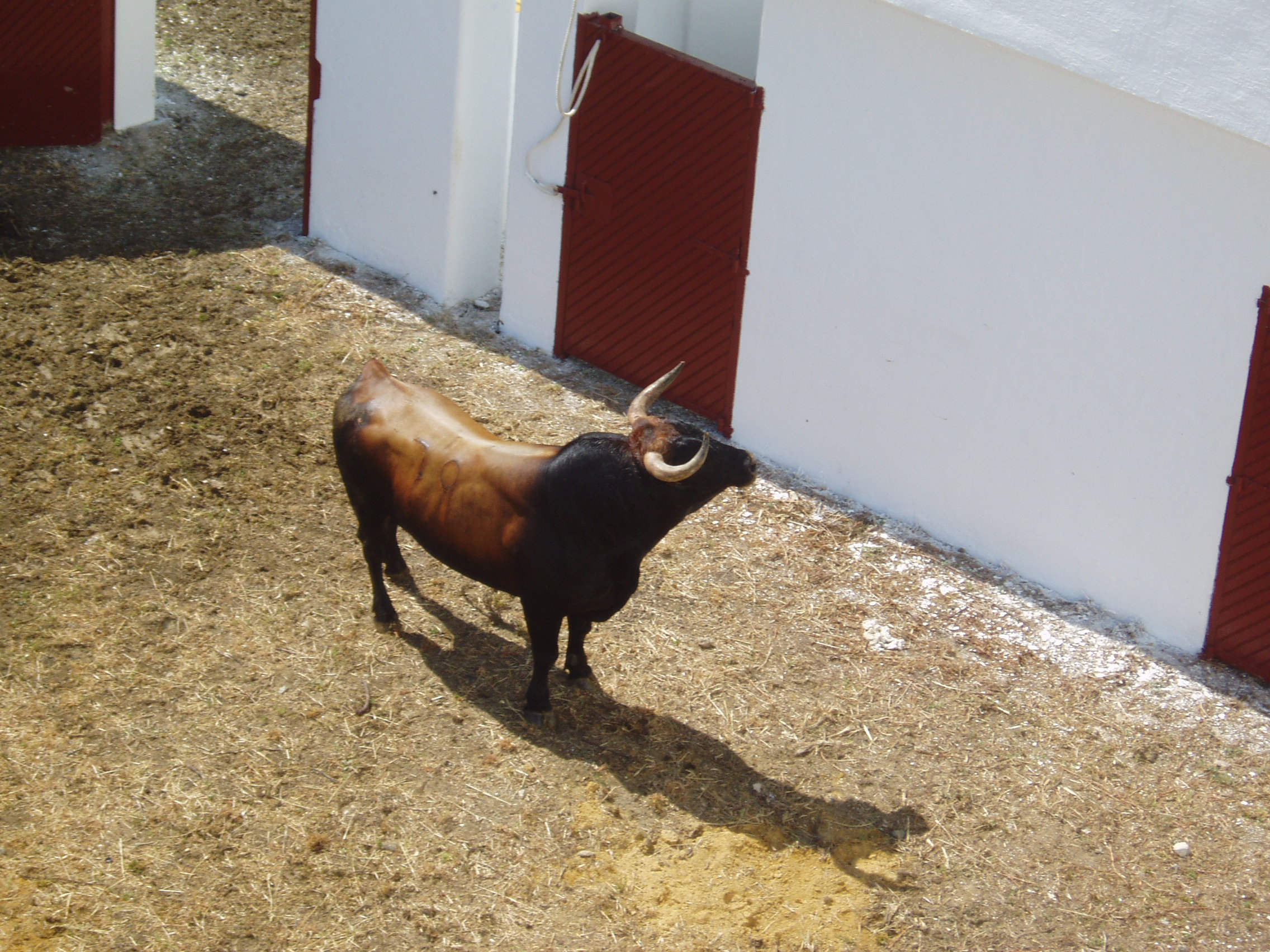 Toro de la ganadería Miura en los corrales de la plaza de toros de Estepona (Málaga).